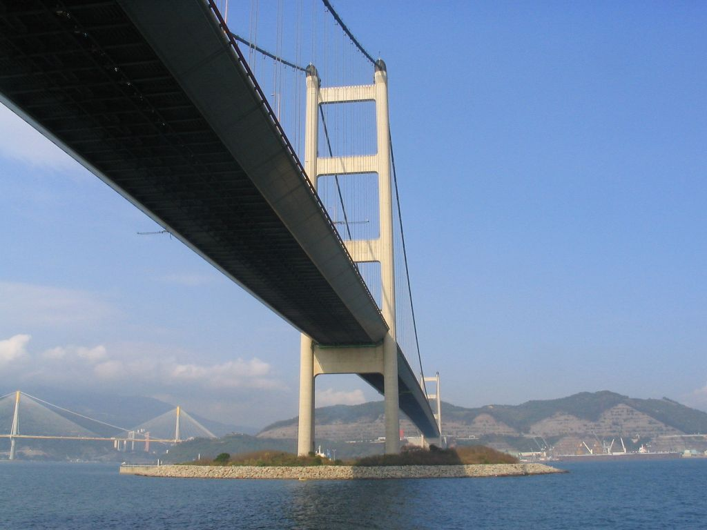 青馬大橋 Tsing Ma Bridge